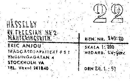 Kvarteret Fresia, Hässelby, ritningsstämpel